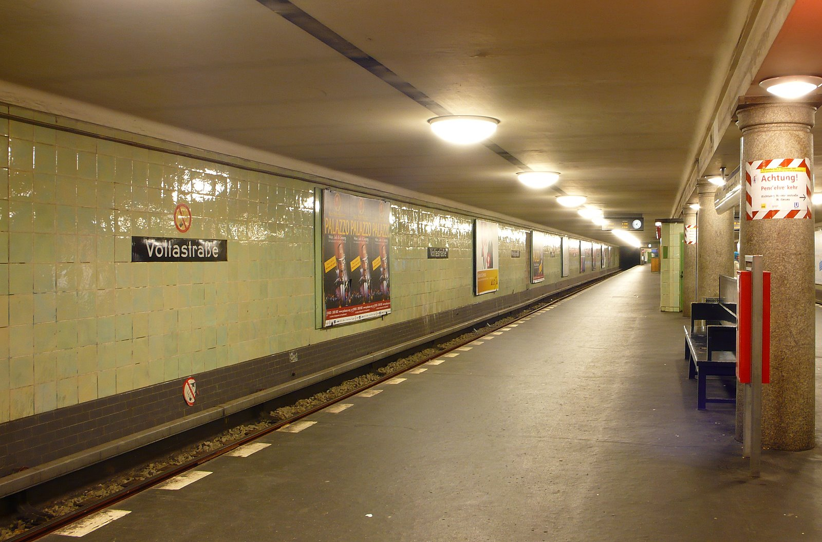 Ubahnhof Voltastr.